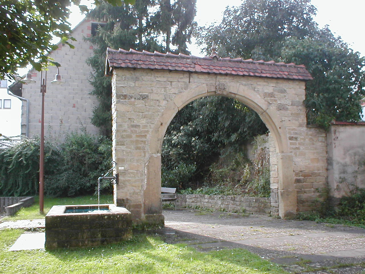 Renaissancetor von 1597 in Richen mit Neippergschem Wappen. Das Sandstein-Fragment wurde nachträglich in der Ortsmitte aufgestellt